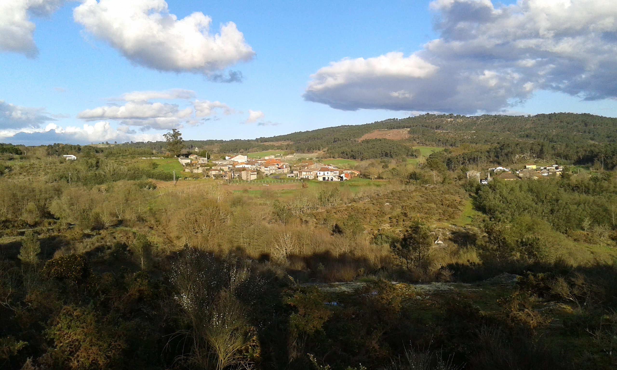 Aldea de Eiras (San Amaro). Ao fondo, á dereita o monte do Santrocado e, á esquerda, Lámbrica, o castro de San Cibrao das Las.